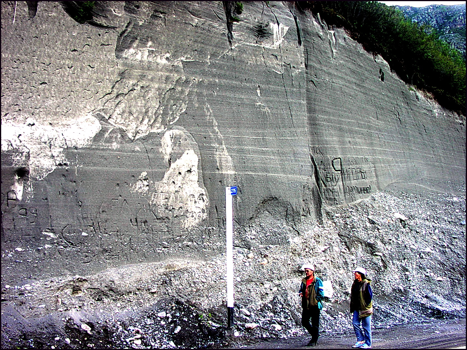 Обнажение дилювиальной террасы р. Катуни вдоль Чуйского тракта недалеко от устья р. Большой Яломан. Горный Алтай.